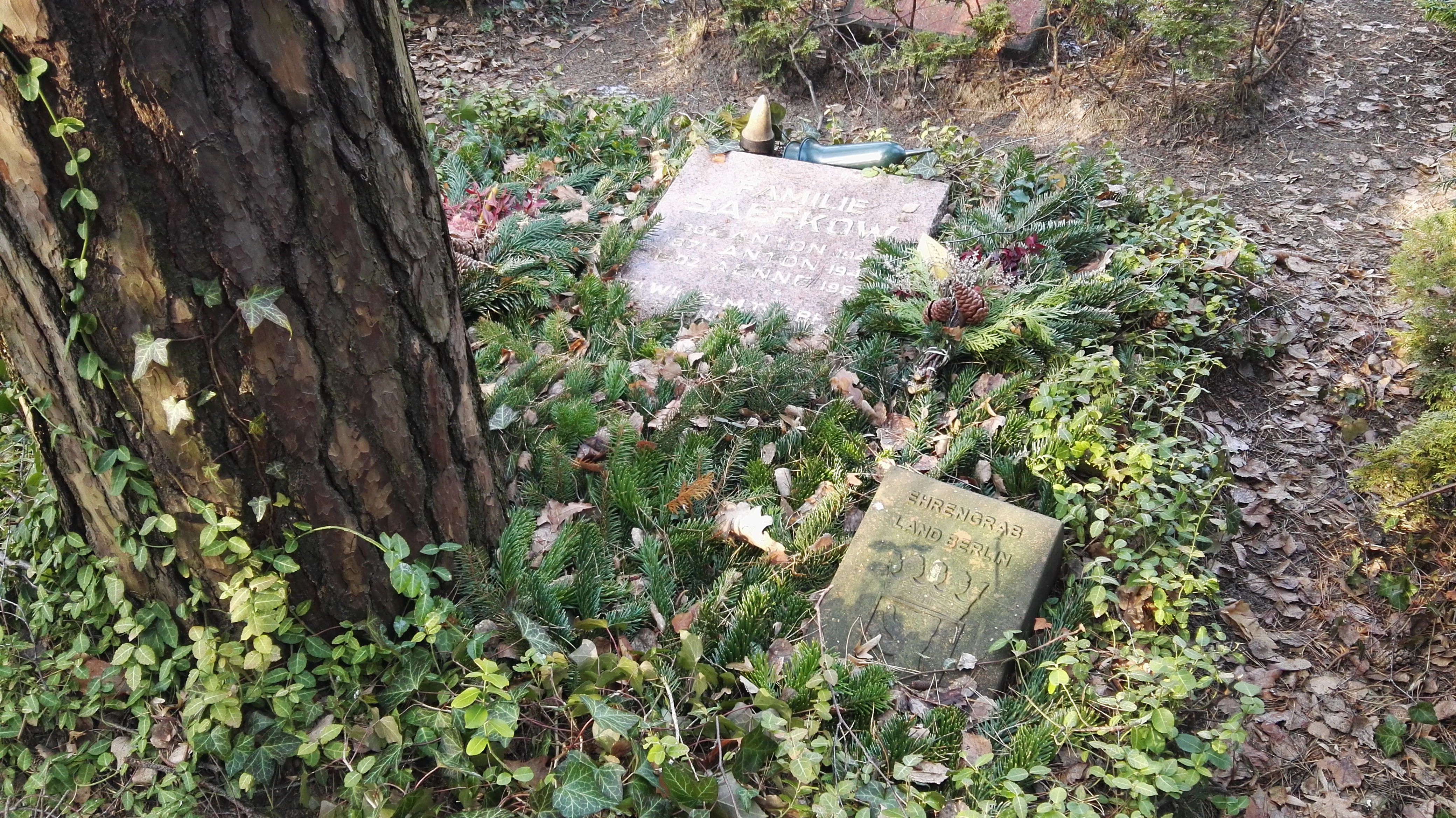 Grab von Anton Saefkow auf dem Friedhof Pankow III in Berlin; Ehrengrab der Stadt Berlin